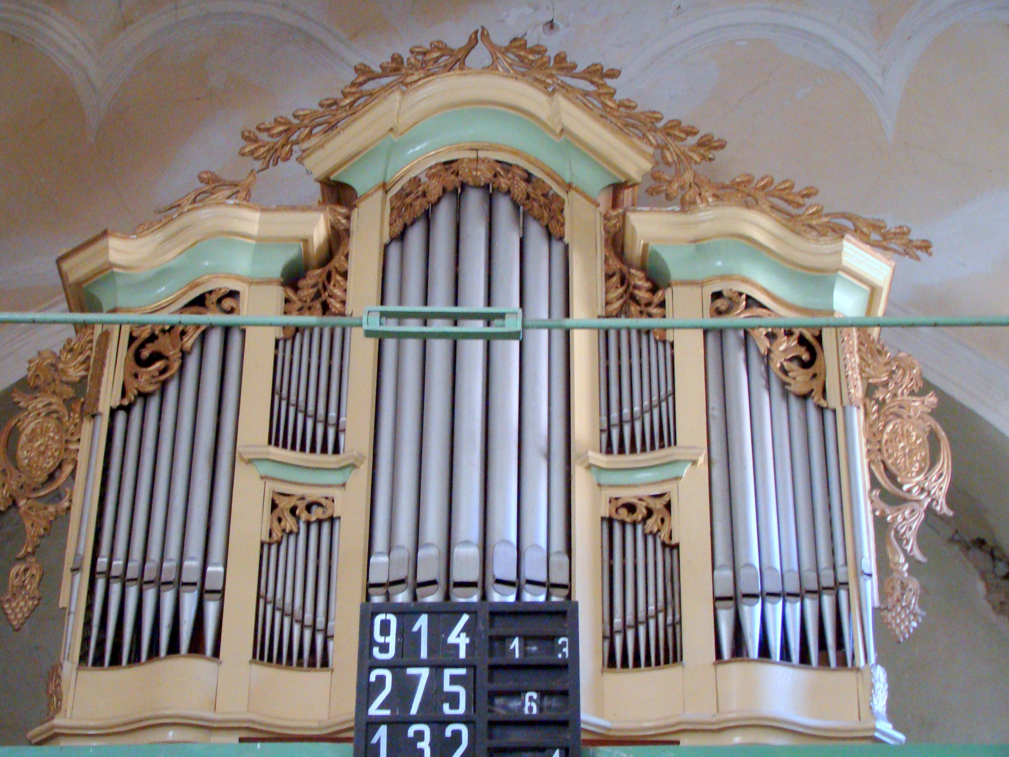 Biserica evanghelică fortificată, sat Șoarș; comuna Șoarș 282 sec. XV - XVI, 1806